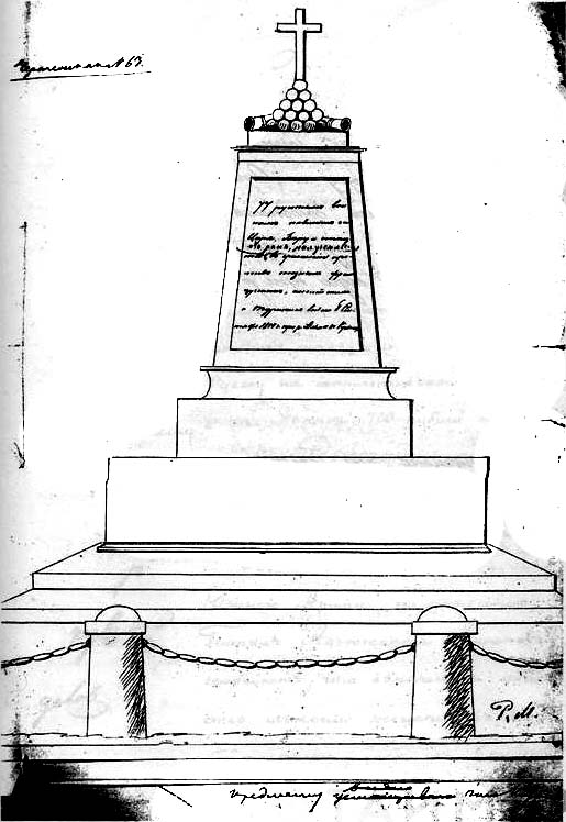 77-ми русским воинам, умершим за Веру, Царя и Отечество от ран, полученных в сражении против союзных французских, английских и турецких войск 8 сентября 1854 года, при р. Альме, в Крыму